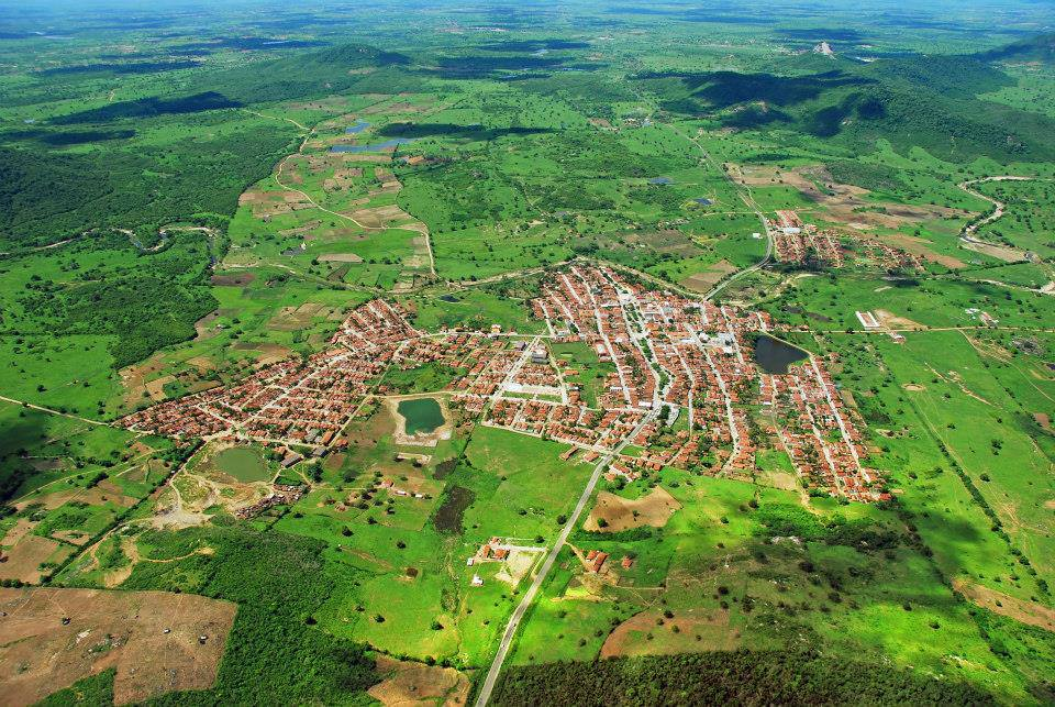 Vista de Gurinhém